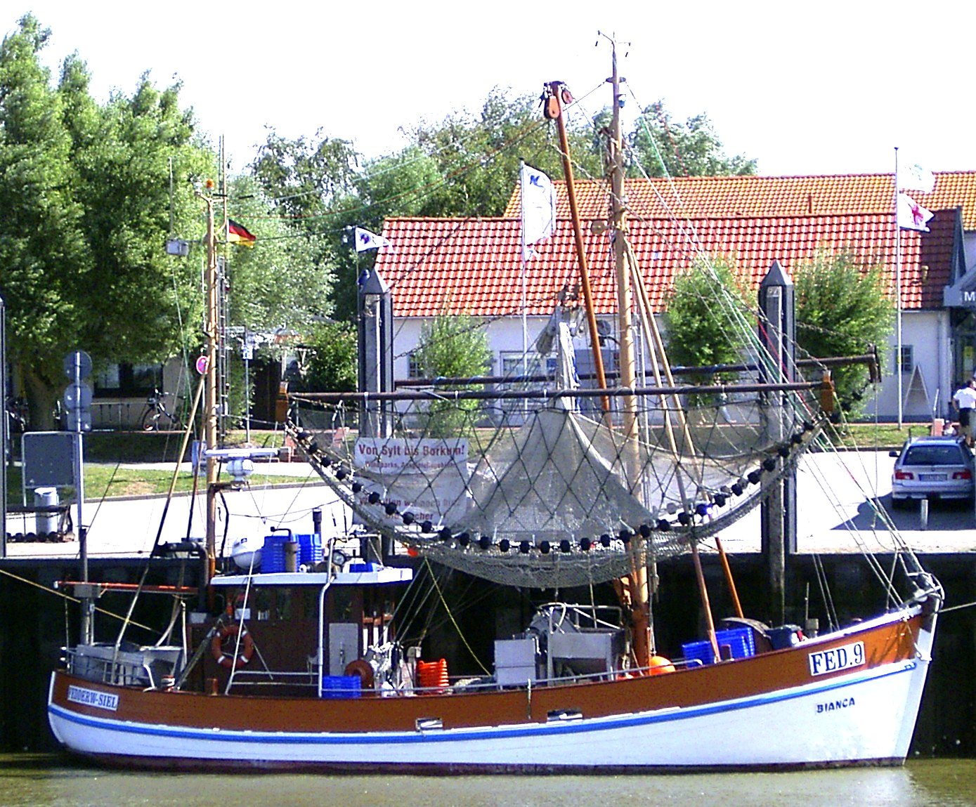 Klassischer Krabbenkutter der deutschen Nordseeküste mit hochgezogenem Fanggeschirr aus Fedderwardersiel.